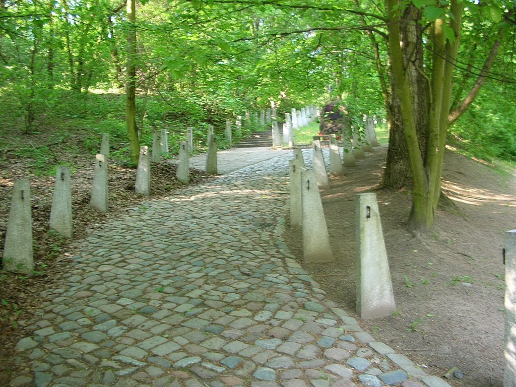 Groby w Dolinie Śmierci